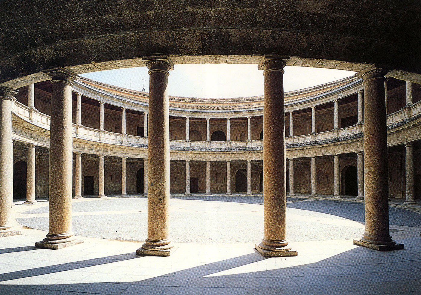 museo